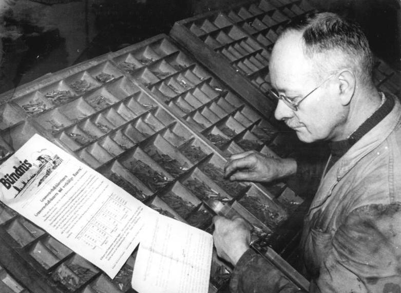 MTS Magdeburg-Südwest, Setzen einer Dorfzeitung Zentralbild Biscan 10.12.1954 Dorfzeitung zur Mobilisierung der Bauern und Landarbeiter. Die MTS Magdeburg-Südwest gibt die Dorfzeitung "Das Bündnis" heraus, die in diesen Tagen die Bauern und Landarbeiter dazu mobilisiert, die Winterfurche noch vor Einbruch des Frostes zu ziehen. UBz: Buchdruckermeister Georg Werner setzt die neueste Ausgabe der Dorfzeitung.